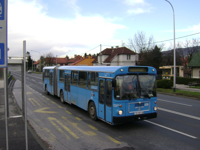 Zglobni autobus MAN SG 220 u vlasništvu ZET-a Zagreb